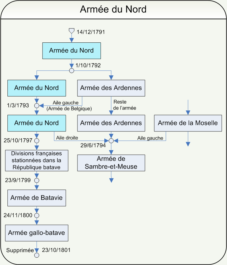 Ordinogramme de l'armée du Nord Dessin au trait exécuté par Papier K.